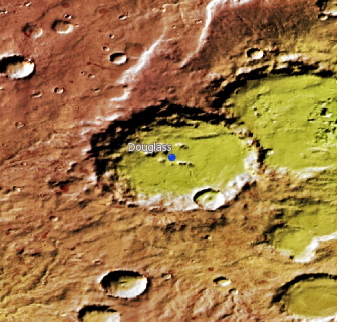 Cráter Marciano Douglass (IAU/USGS/Goddard/A SU/USGS)